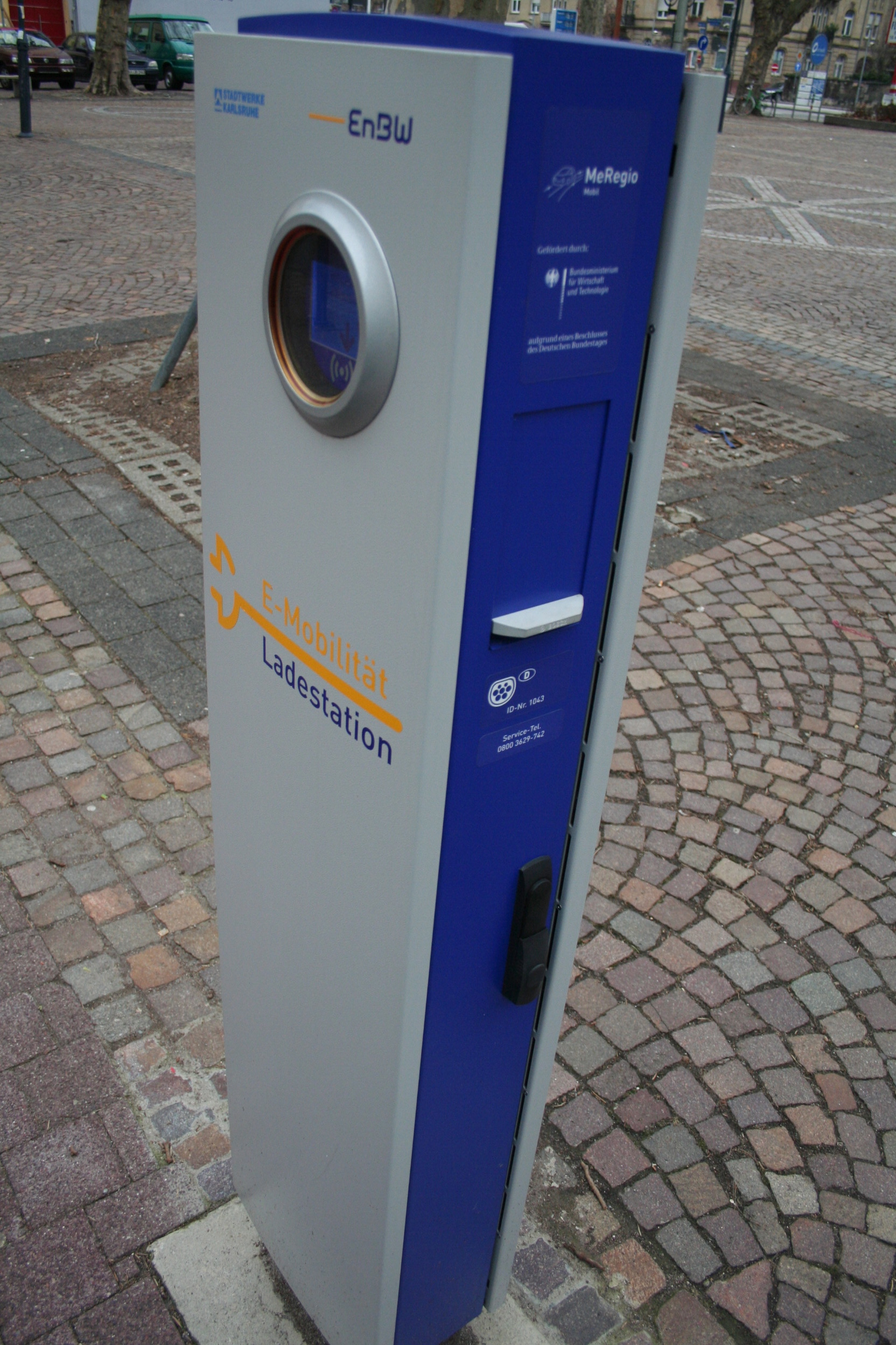 Eine Ladestation für Elektrofahrzeuge der Energie Baden-Württemberg (EnBW). Ort: Karlsruhe, Gottesauer Platz